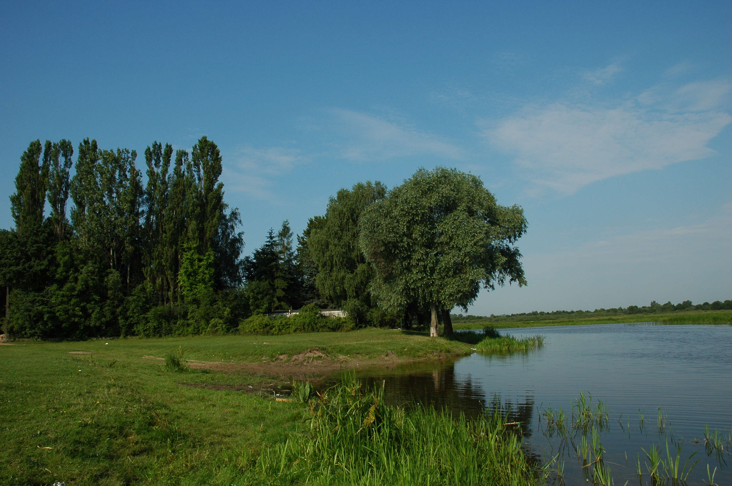 Rozlewiska Bugu w Kuligowie